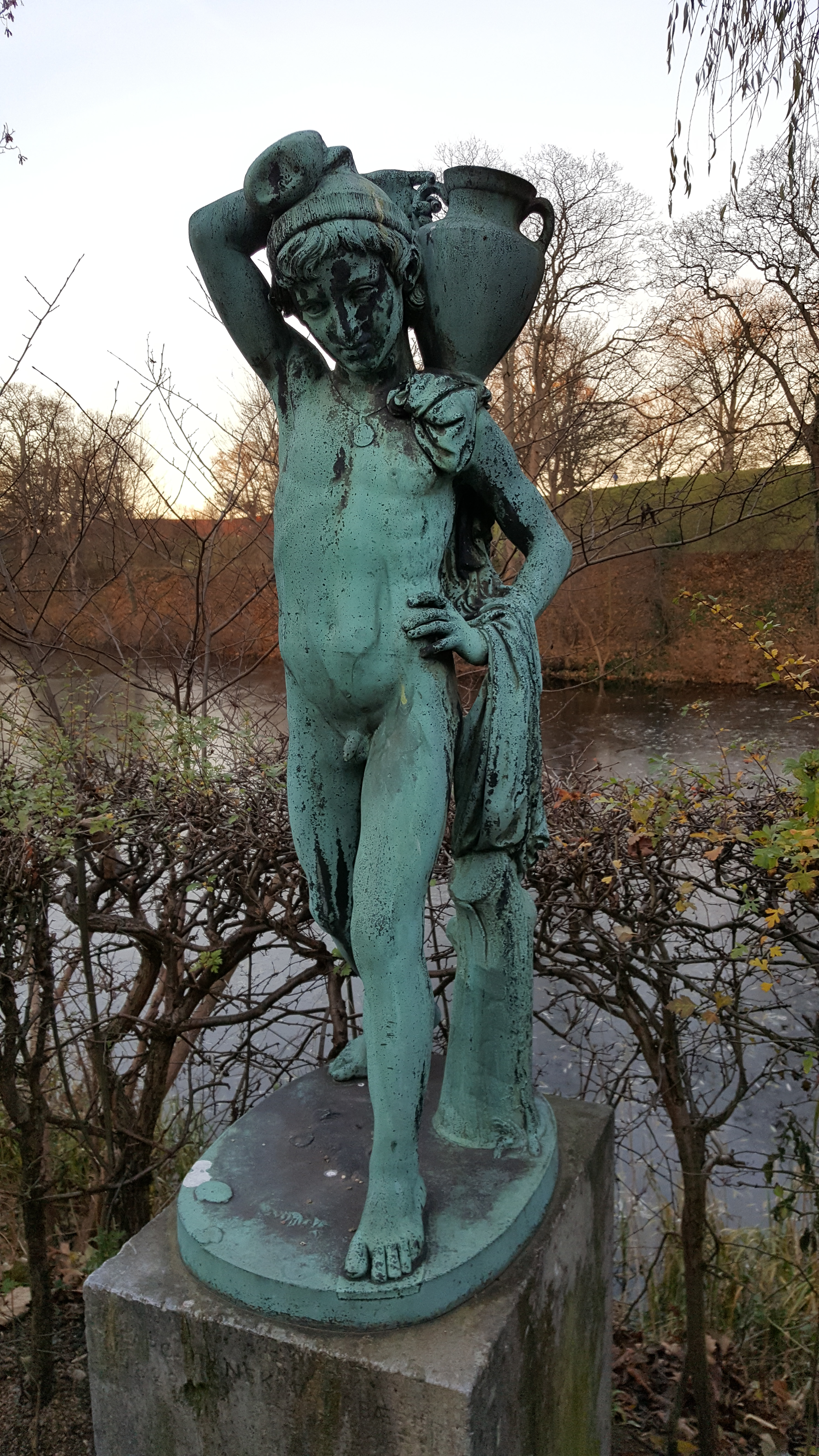 Theobald Steins "Venetiansk vandbærer" i parken ved Kastellet i København